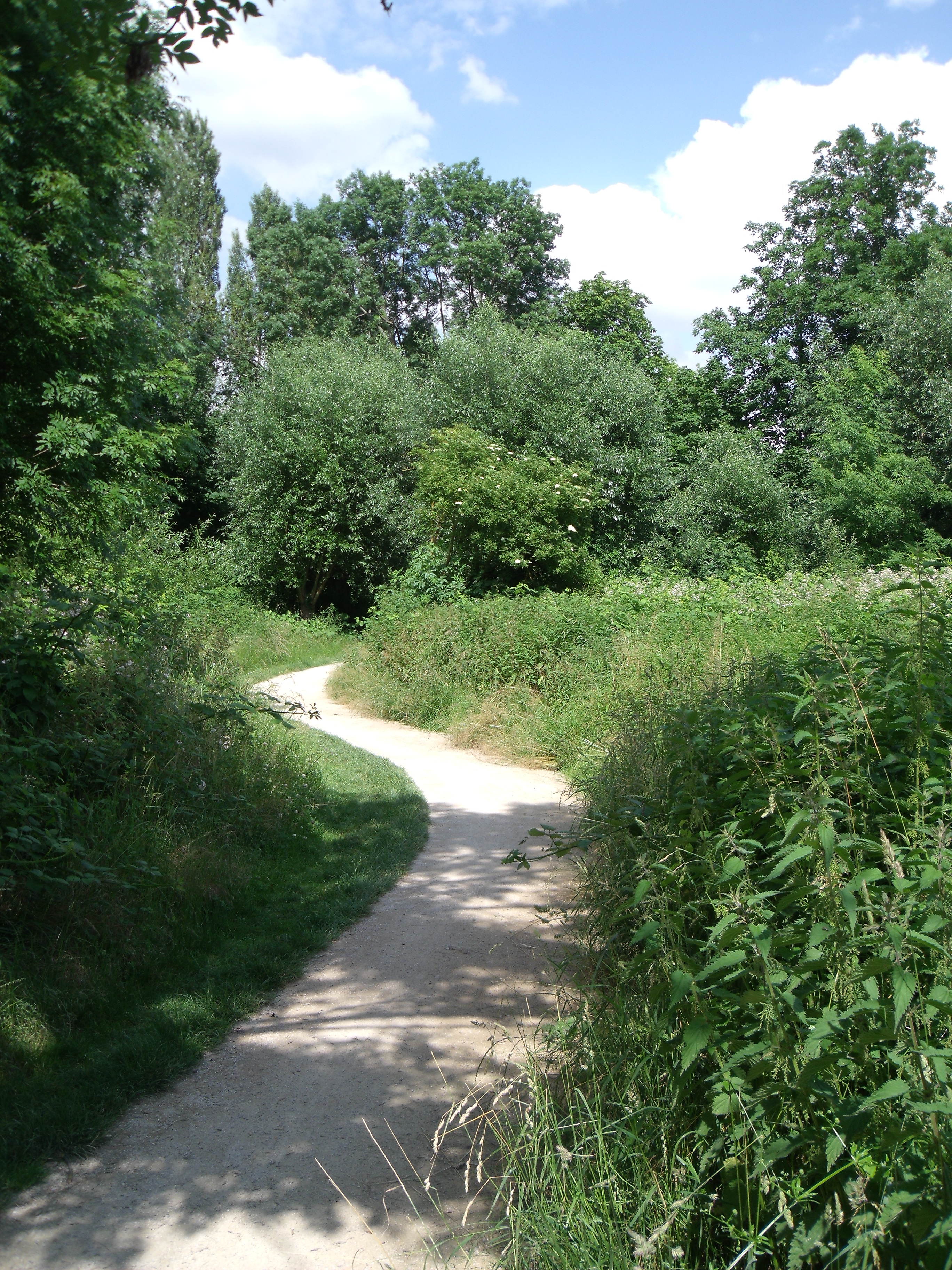 Liaison Verte à Montgeron (Plaine de Chalandray)